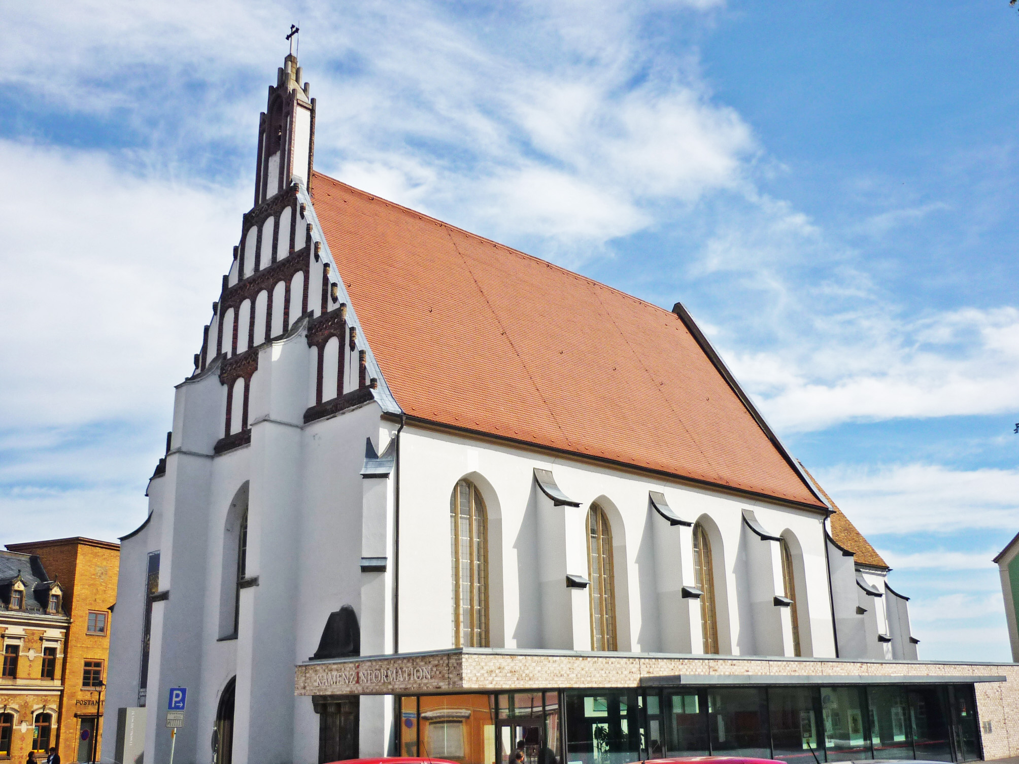 Kamenz, ehemalige Klosterkirche St. Annen, jetzt Sakralmuseum